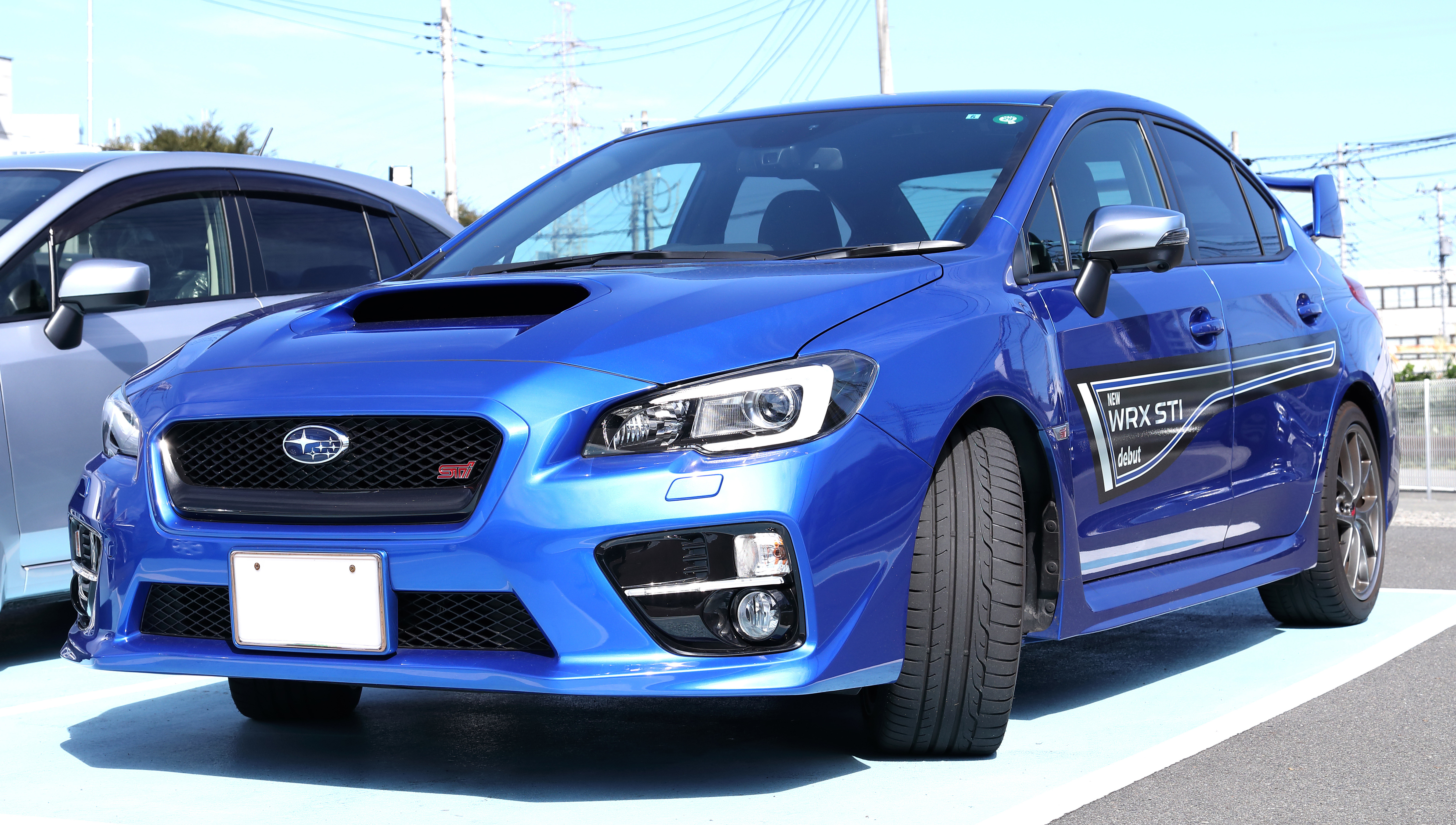 スバル WRX STI (VA)